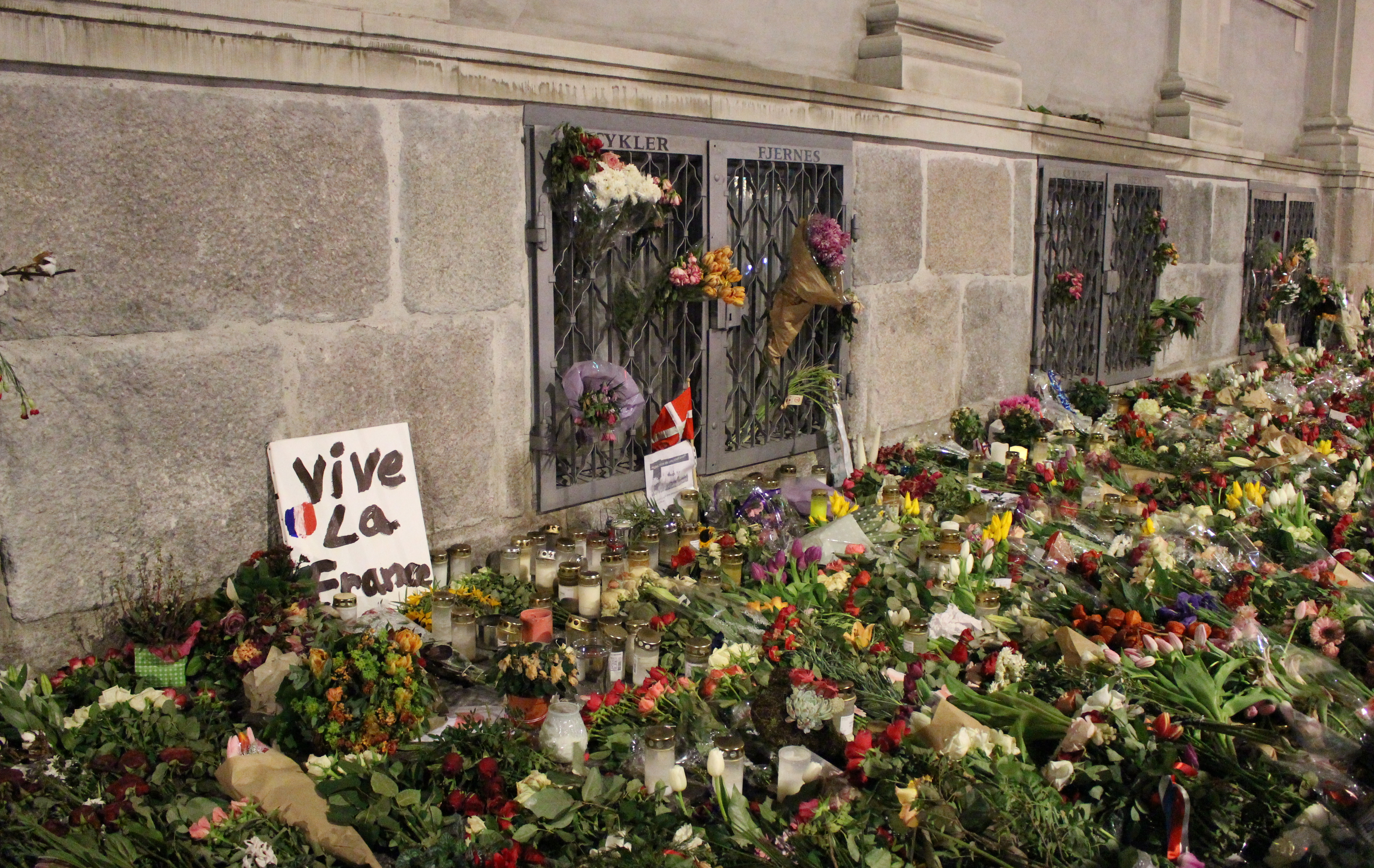 Vive La France: Blomster ved den franske ambassade som følge af Terrorangrebene i Paris november 2015.